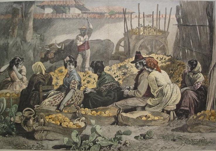 In the sunny South. Packing oranges in the marketplace at Seville, Spain (En el soleado sur. Empacando naranjas en el mercado de Sevilla, España). Xilografía coloreada a mano de E. Buckman